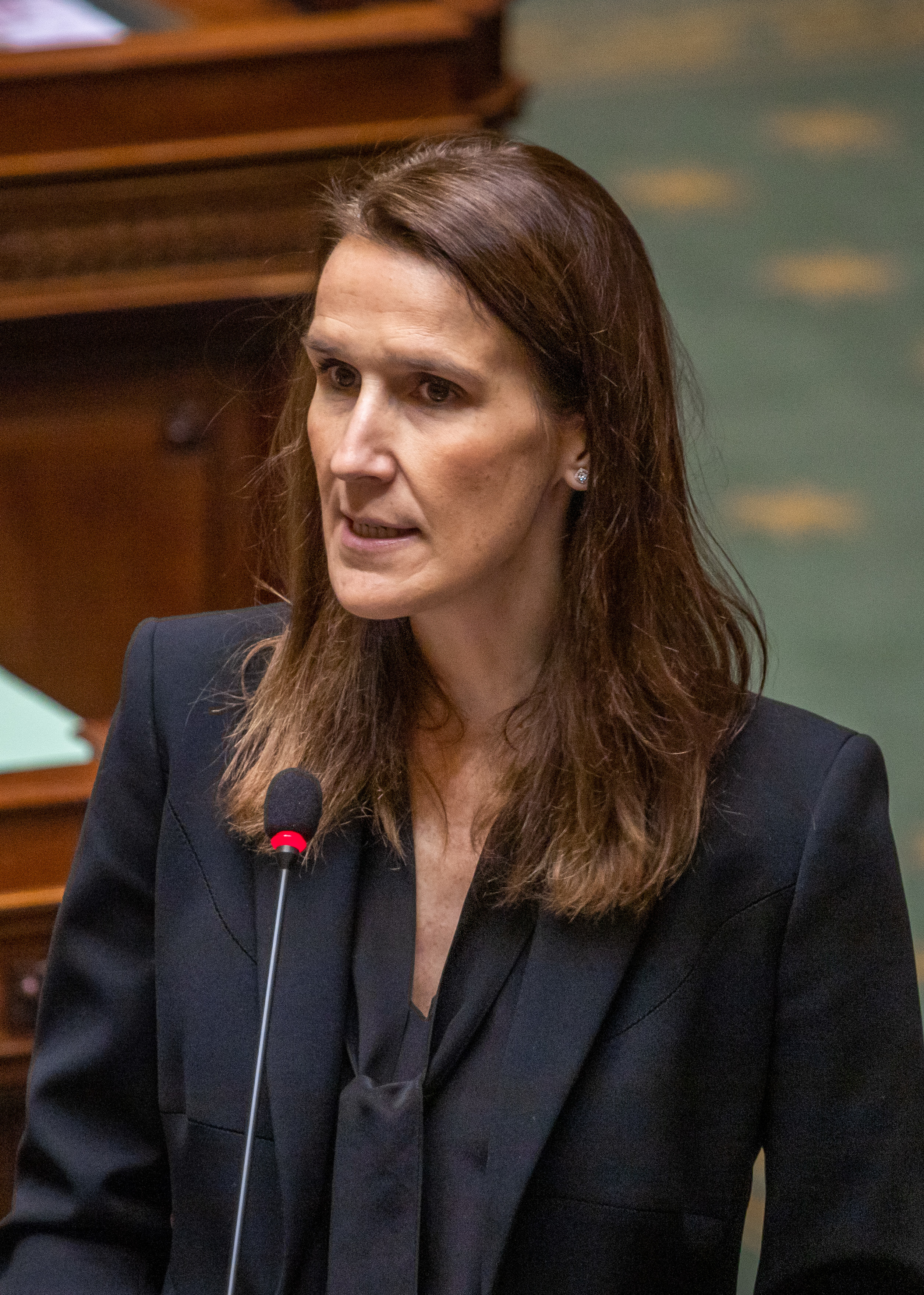 Sophie Wilmès à la Chambre des représentants